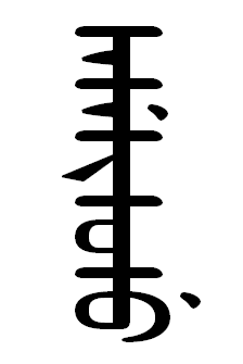 жажэжижожу